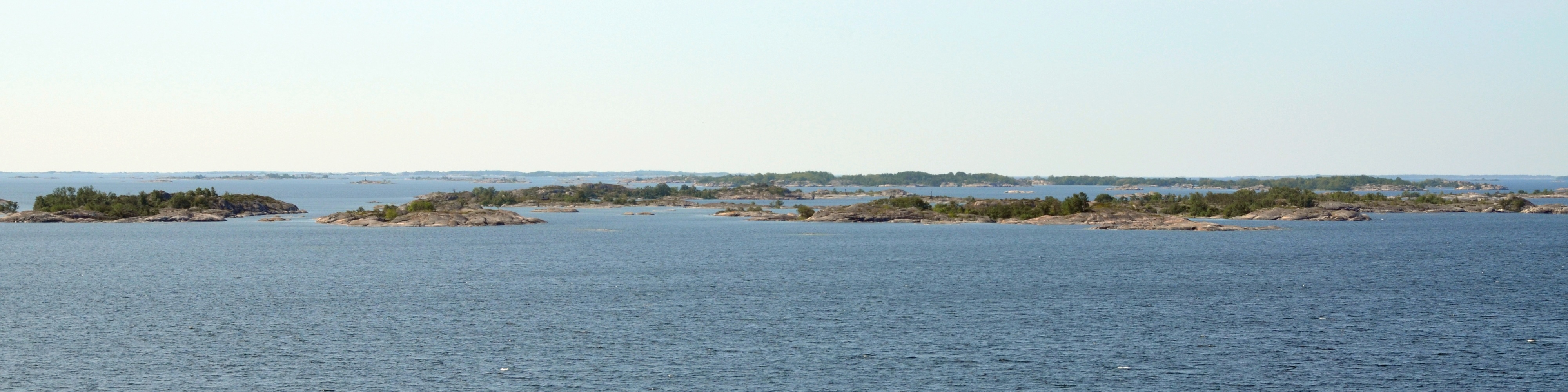 Söderarms skärgård